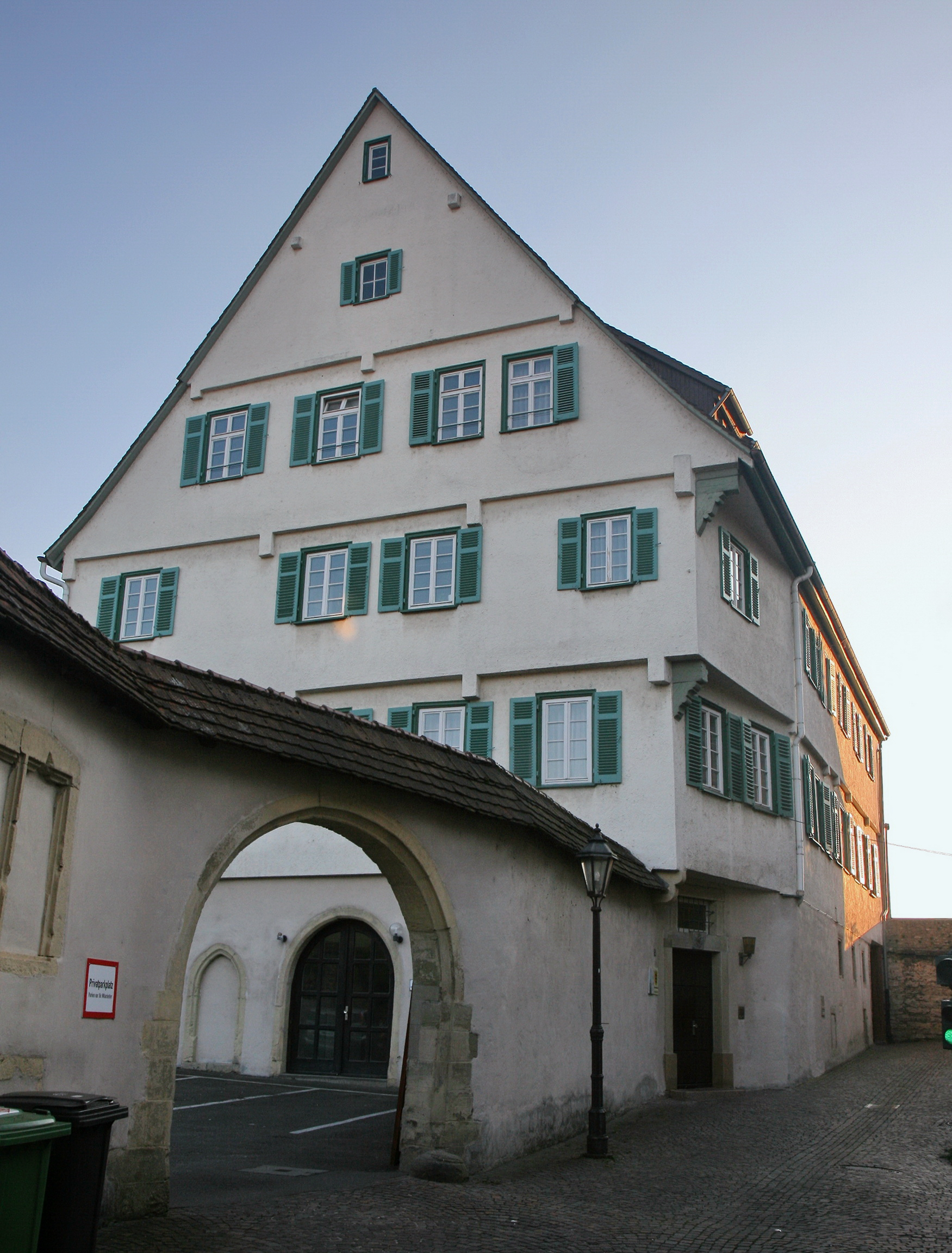 Amtsgericht Besigheim, Amtsgerichtsgasse 5 in Besigheim. Erste urkundliche Nennung des Anwesen ist Ende des 15. Jahrhunderts. Von 1821-1838 Oberamtsgericht. Kulturdenkmal gemäß § 2 DSchG (Gebäude).